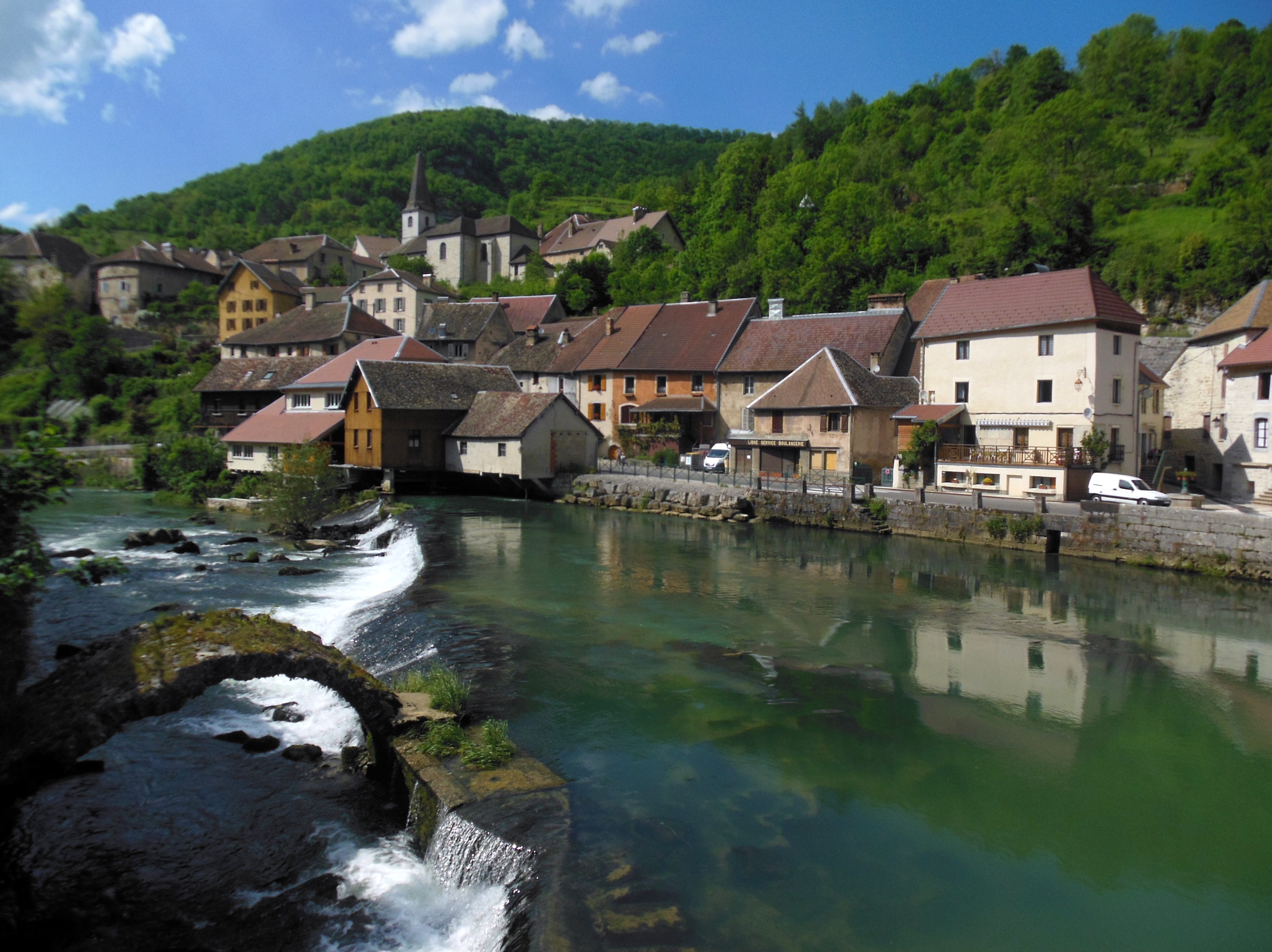 Vue du village de Lods, de la rivière Loue et d'un vestige de pont (XVIe s), depuis le Chemin des Forges.